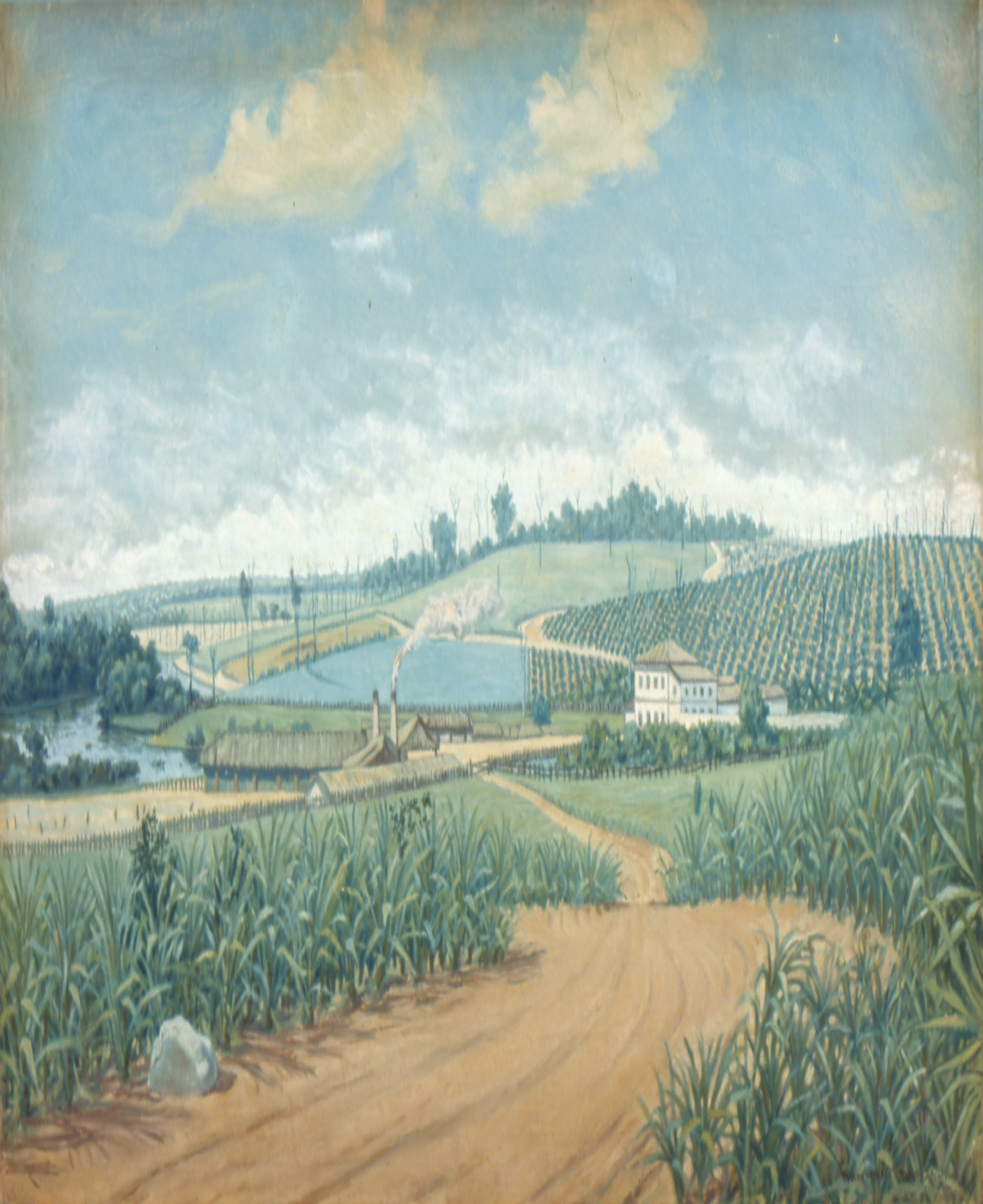 Obra que integra o acervo do Museu Paulista da USP. Coleção Fundo Museu Paulista - FMP